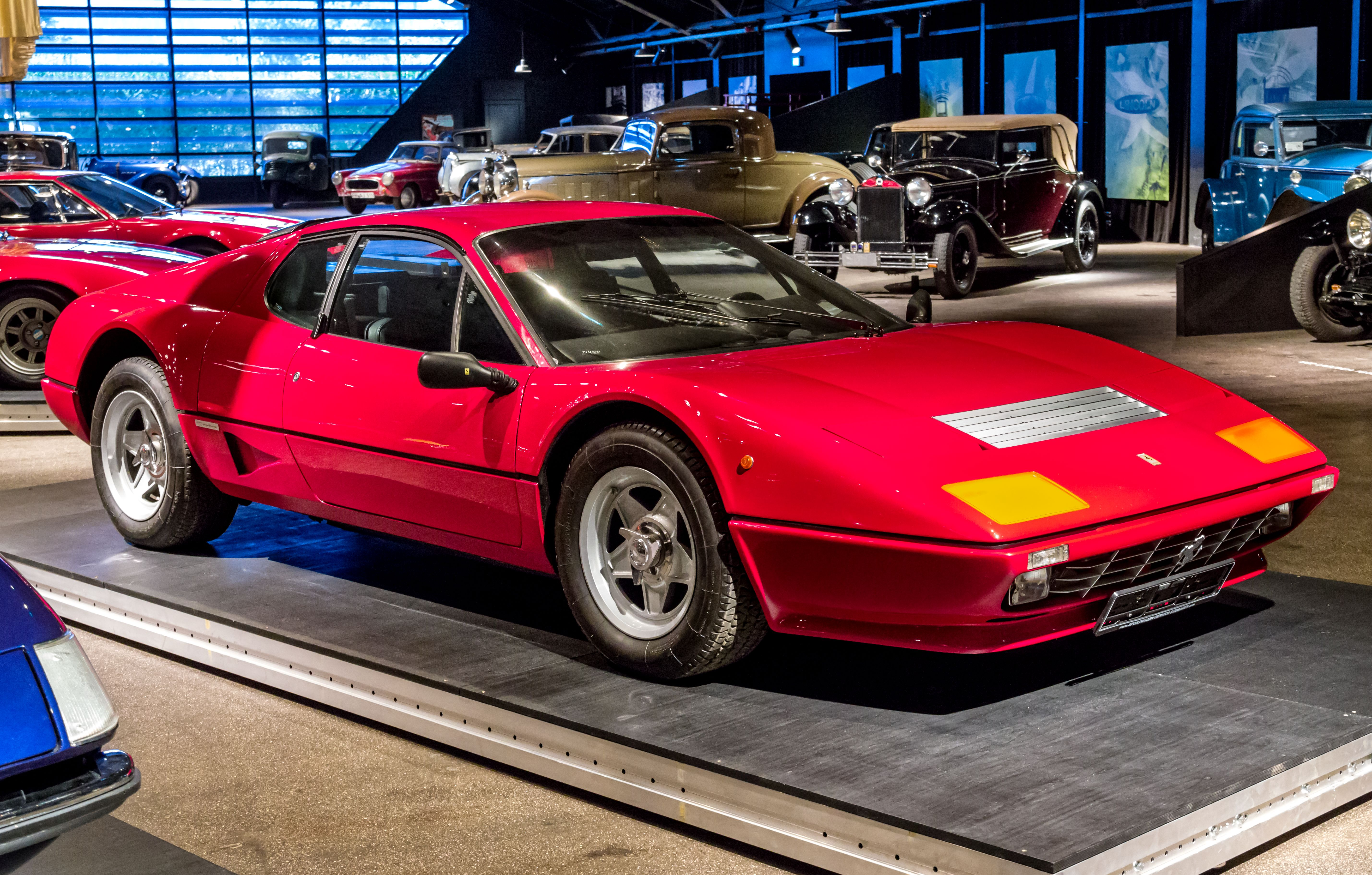 Das Volante Oldtimermuseum in Kirchzarten